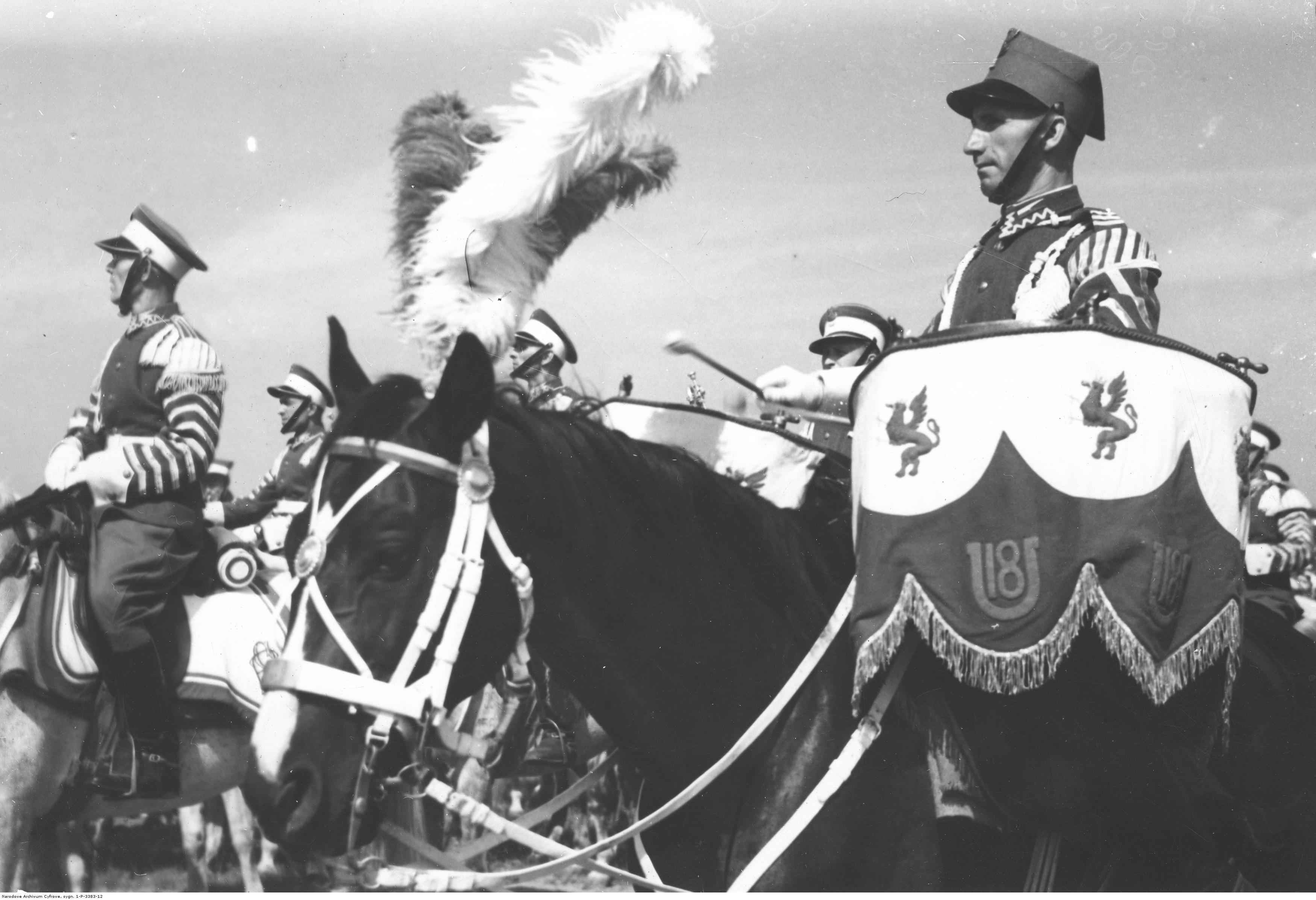 Rocznica bitwy warszawskiej – uroczystości Święta Żołnierza w Wejherowie 15 sierpnia 1938. Dobosze orkiestry 18 Pułku Ułanów Pomorskich. Koncern Ilustrowany Kurier Codzienny - Archiwum Ilustracji. Sygnatura: 1-P-3383-12